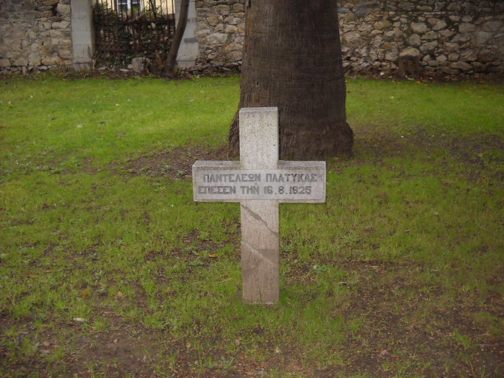 πλατύκας